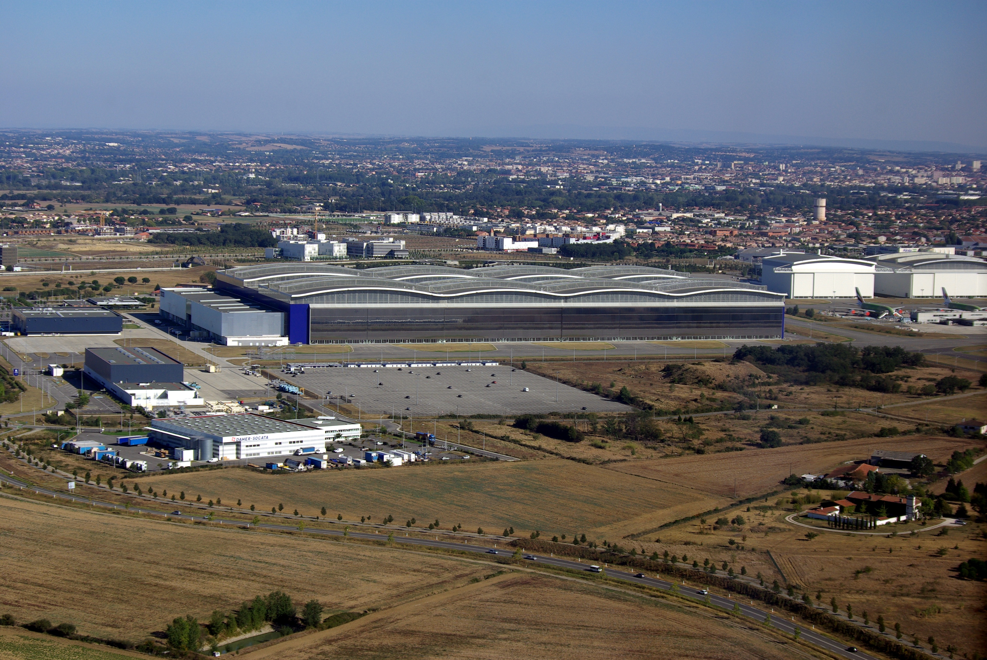 Hall d'assemblage final de l'A380, l'usine Lagardère.